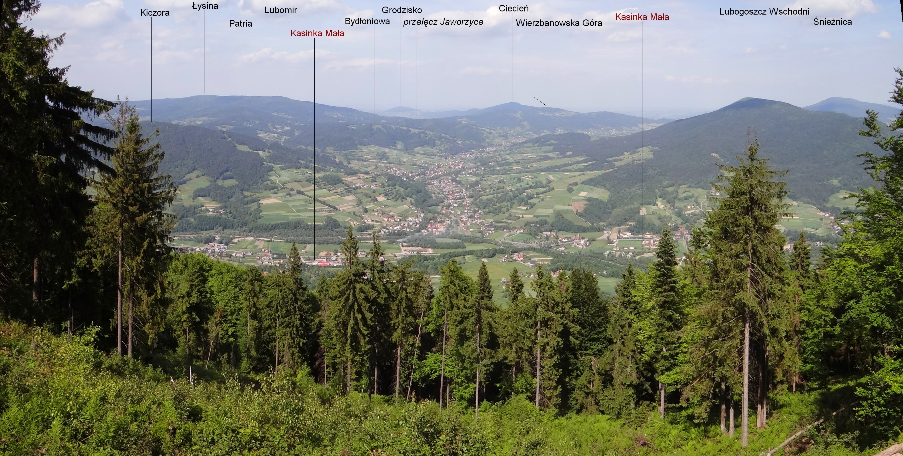 Polanka paralotniarzy na Szczeblu i panorama widokowa